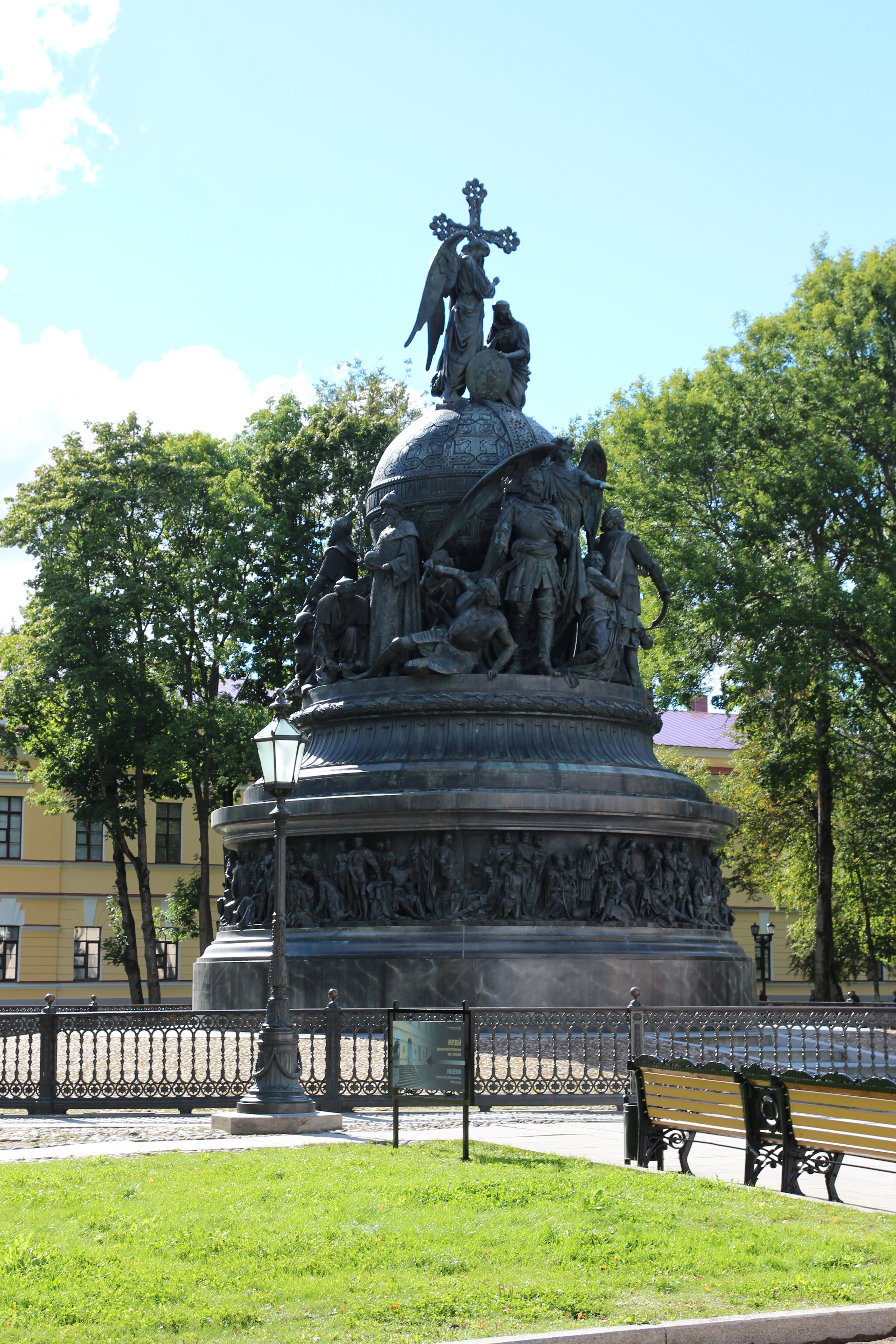 Памятник тысячелетию России